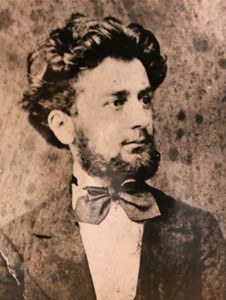 Gustav Vacek, český akademický malíř